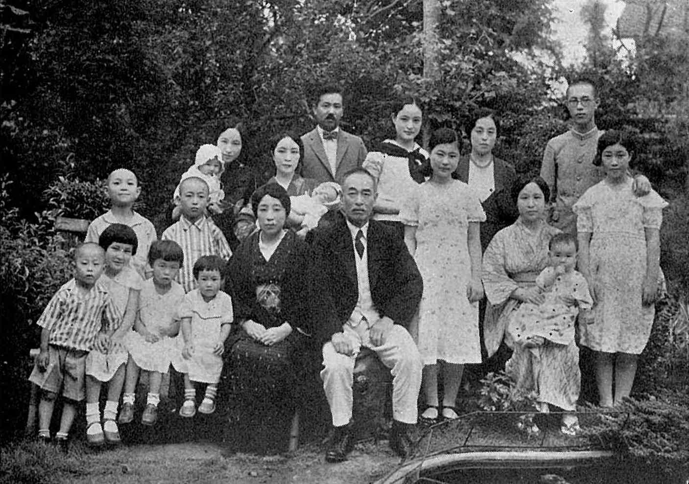 昭和8年夏 針塚長太郎家族 孫らとともに（上田市松原町の自宅にて）